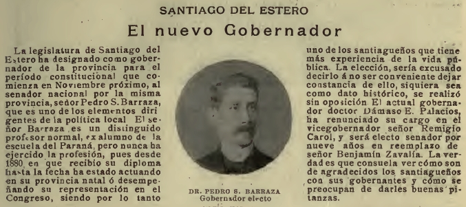 Nombramiento del senador Pedro Segundo Barraza como gobernador de Santiago del Estero